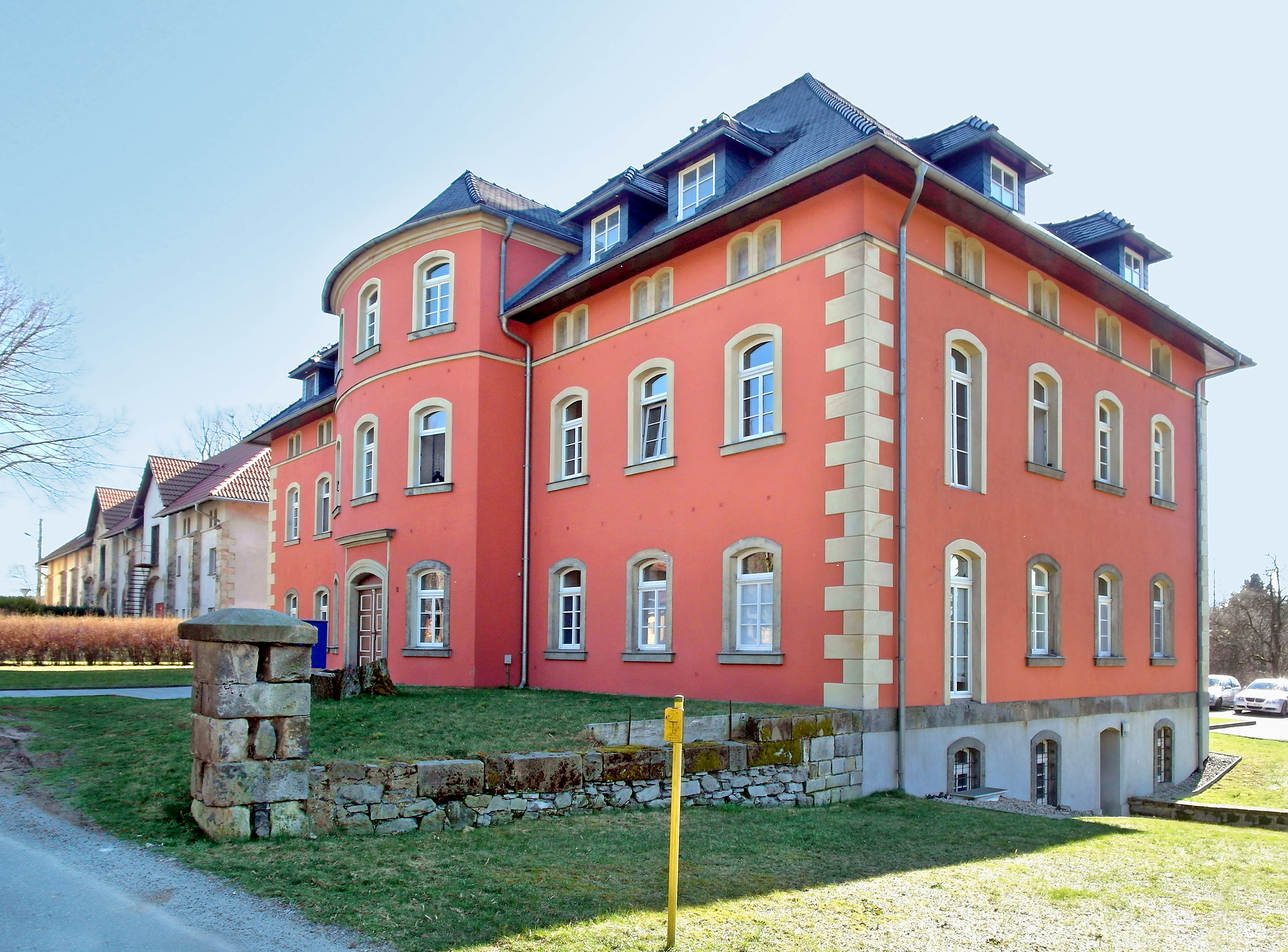 27.03.2017 02794 Spitzkunnersdorf (Leutersdorf) Am Hofeteich 4: Herrenhaus Spitzkunnersdorf, erbaut zwischen 1865 und 1873 für Ernst Gustav Hermann von Kyaw. Straßenseite, Sicht von Norden. [SAM9002.JPG]20170327400DR.JPG(c)Blobelt